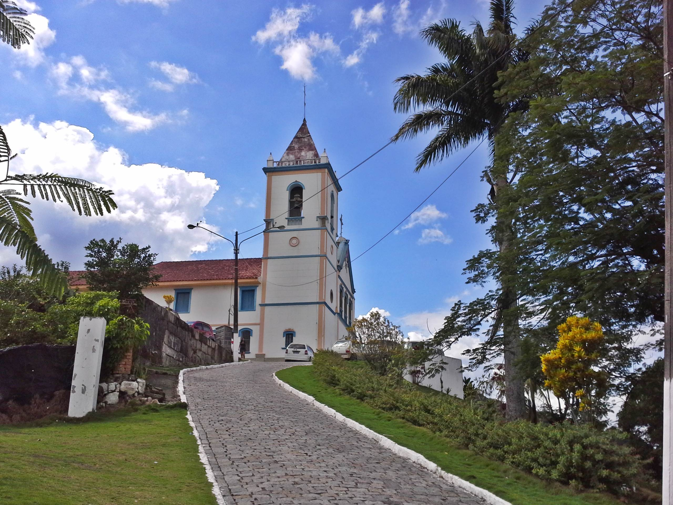 Surui